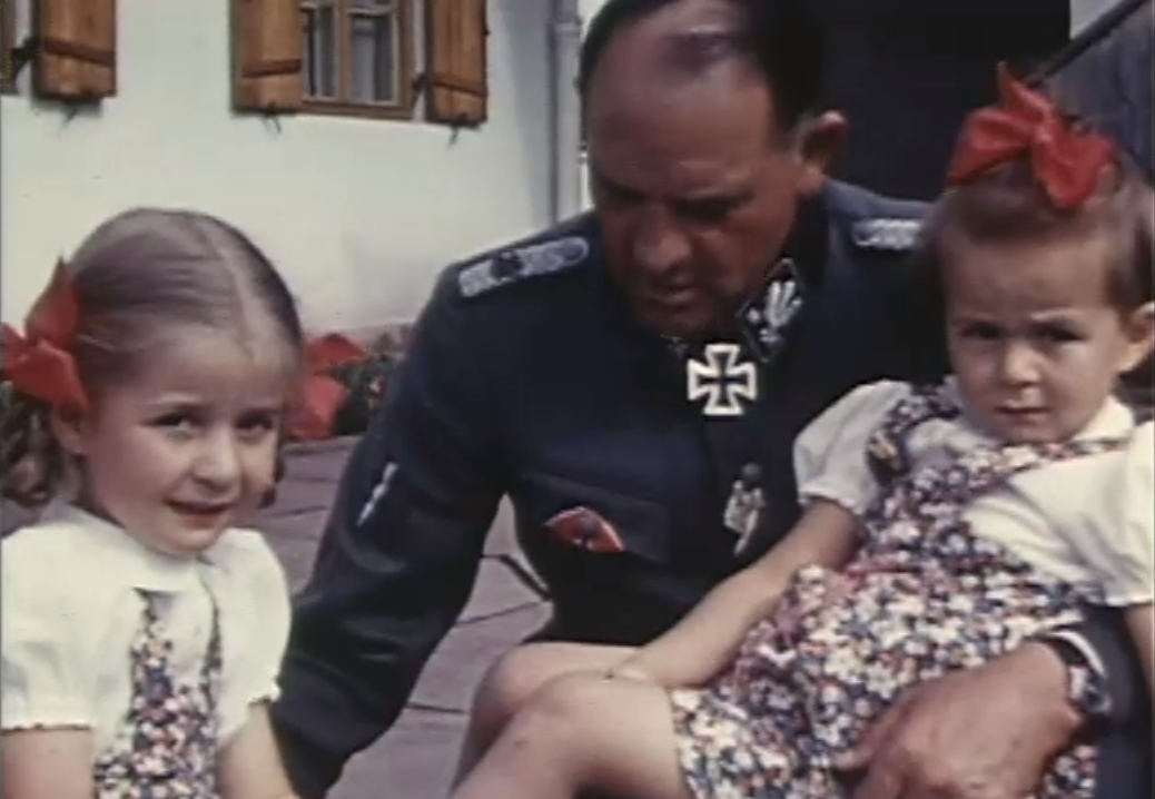 Von links: Hilde Speer, Sepp Dietrich und Margret Speer auf der Terrasse des Berghofs